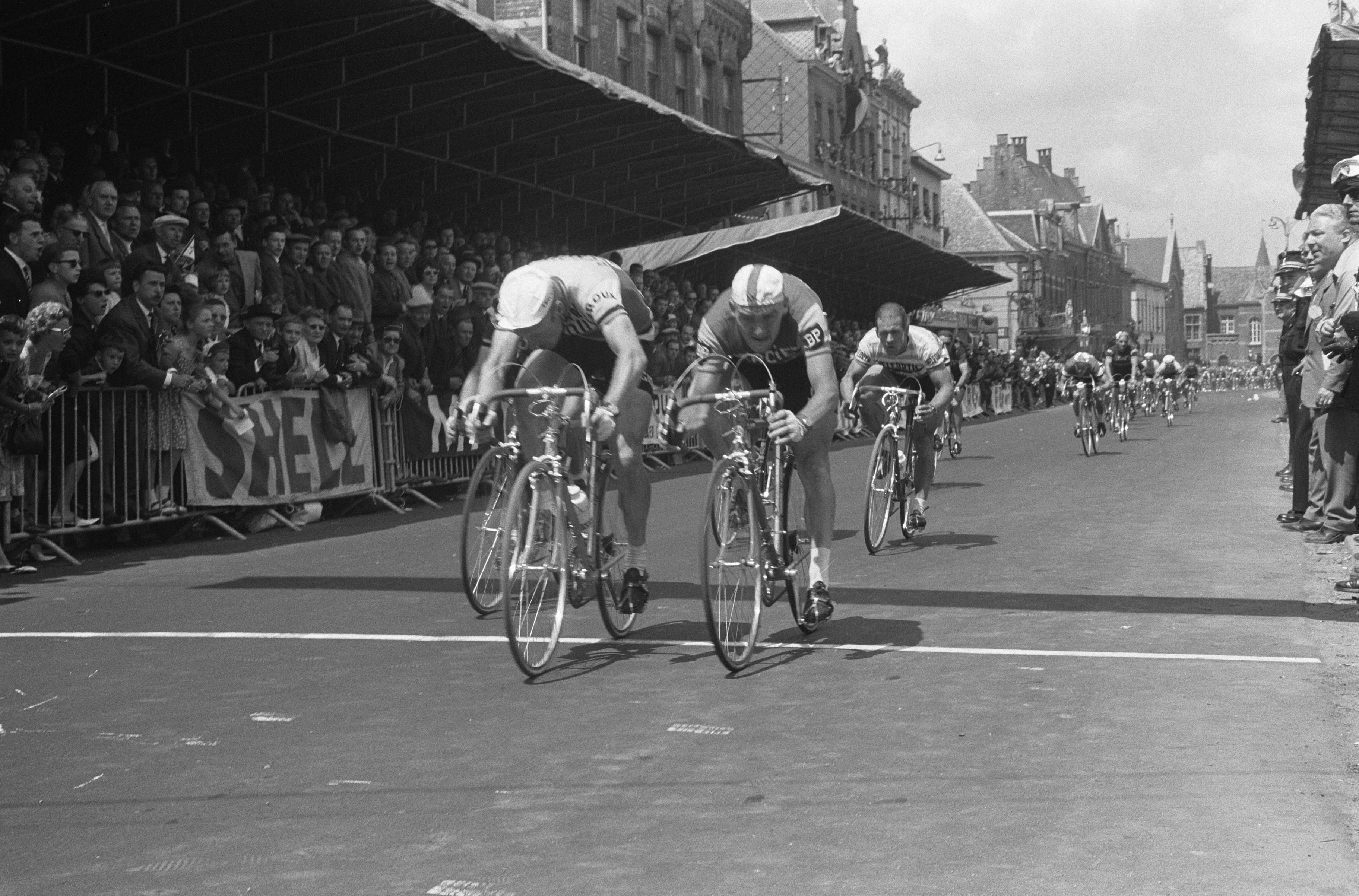 Collectie / Archief : Fotocollectie Anefo Reportage / Serie : [ onbekend ] Beschrijving : Tweede etappe Tour de France, halve etappe Spa-Herentals (finish Darrigade (links, winnaar) en Belg Melckenbeeck) Datum : 25 juni 1962 Locatie : Herentals Trefwoorden : wielrennen Persoonsnaam : Darrigade, André Instellingsnaam : Tour de France Fotograaf : Pot, Harry / Anefo Auteursrechthebbende : Nationaal Archief Materiaalsoort : Negatief (zwart/wit) Nummer archiefinventaris : bekijk toegang 2.24.01.05 Bestanddeelnummer : 914-0612